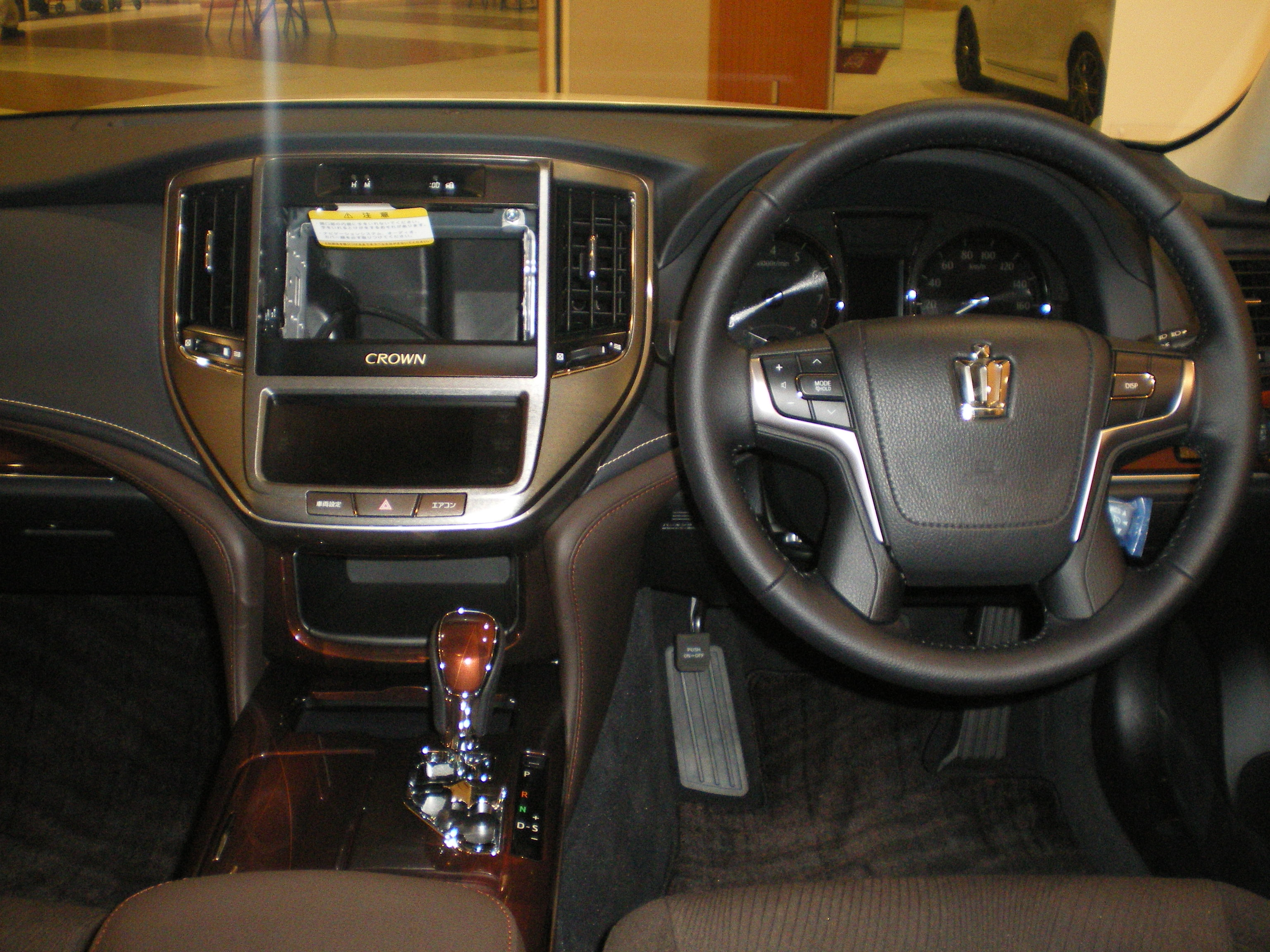 トヨタ・クラウン